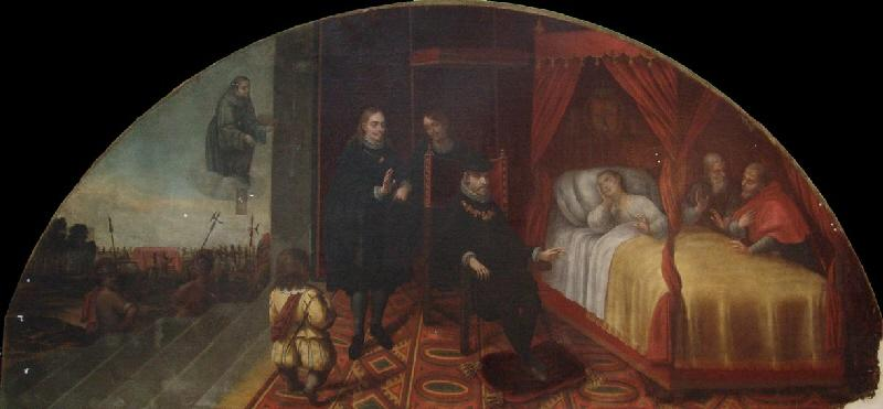 La obra representa al rey Felipe II de España (1527-1598) visitando a su hijo, el príncipe Carlos de Austria, que estaba enfermo, aunque al mismo tiempo en el lienzo también aparece el entierro del joven príncipe.